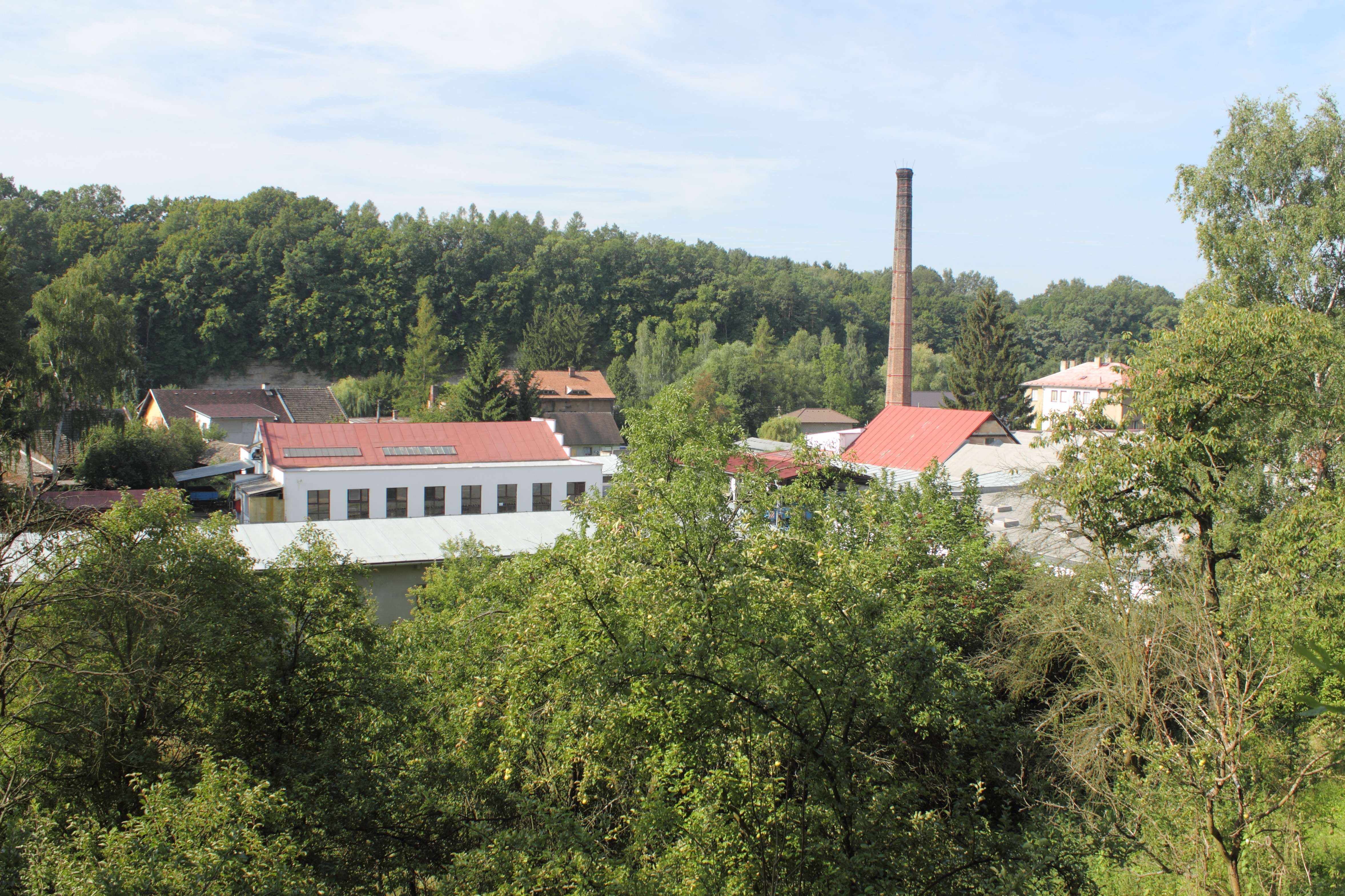 Hubálov, Loukovec